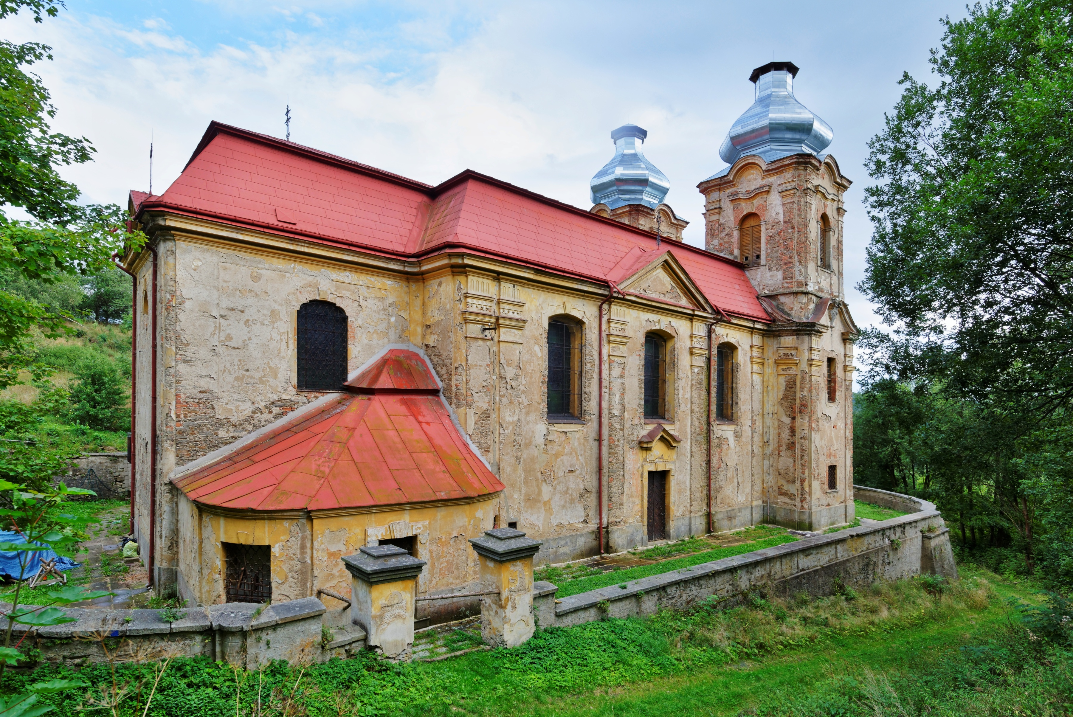 Kostel Navštívení Panny Marie ve Skocích u Žlutic, okr. Karlovy Vary. Severní průčelí.